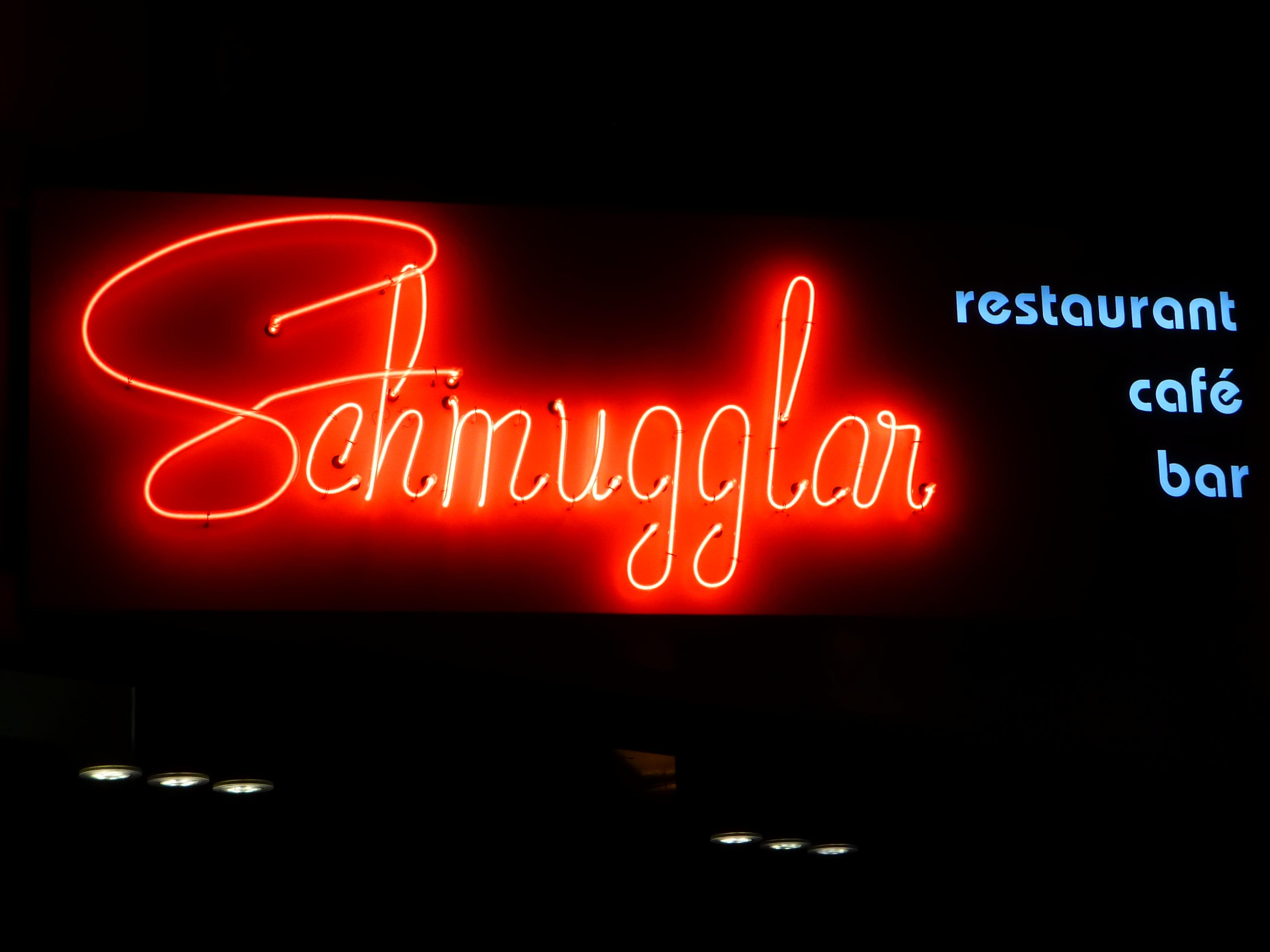 Leuchtreklame des Restaurants „Schmugglar“ im Zentrum von Lustenau. Der Name erinnert an die lebhafte Schmuggeltätigkeit durch die Lustenauer im 19. und 20. Jahrhundert.